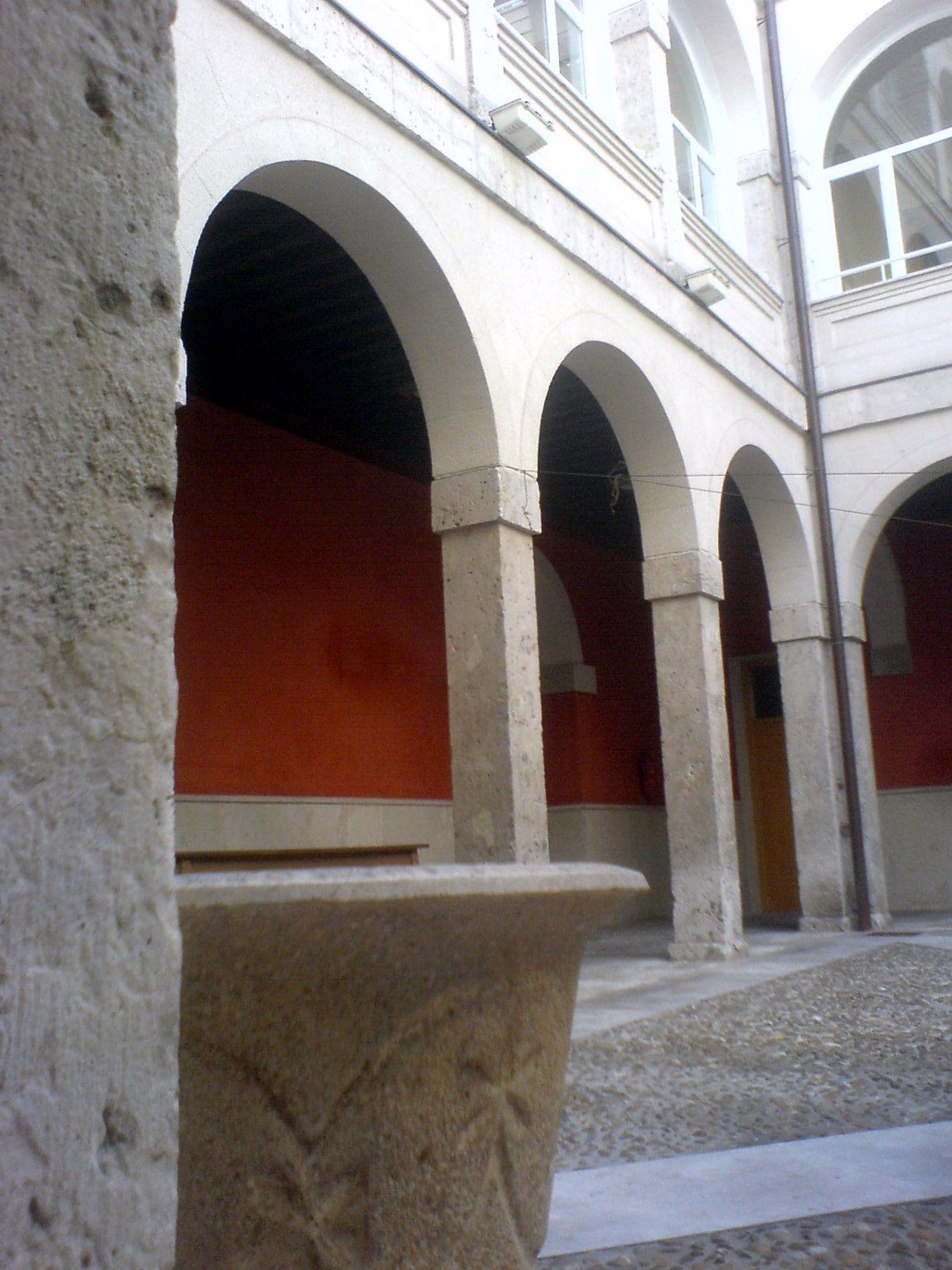 Interior del patio renacentista del palacio de los Villagómez, con los pilares y los arcos de medio punto característicos.